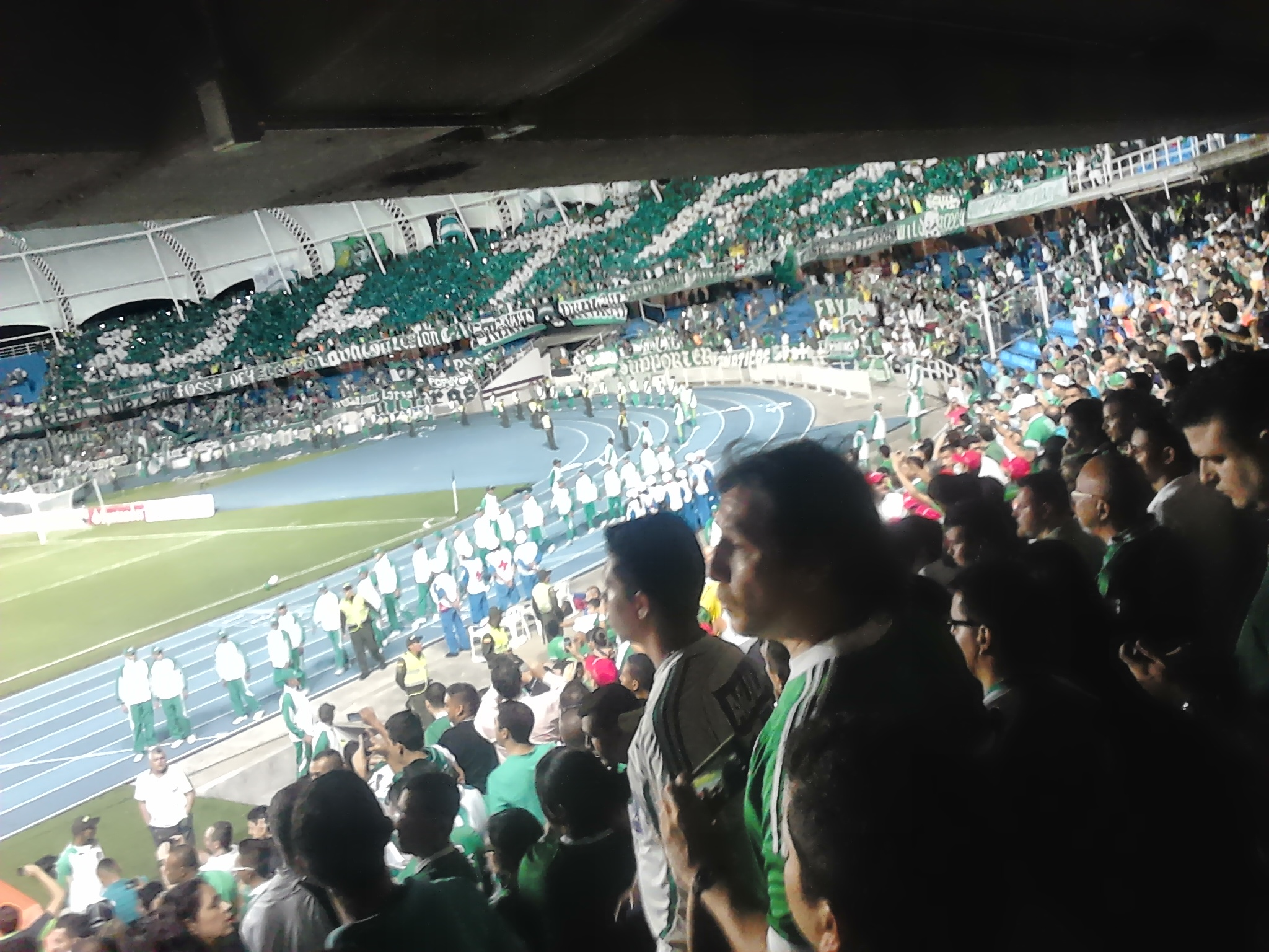 Deportivo Cali del Valle del Cauca vs Peñarol de Uruguay por la Copa Sudamericana.